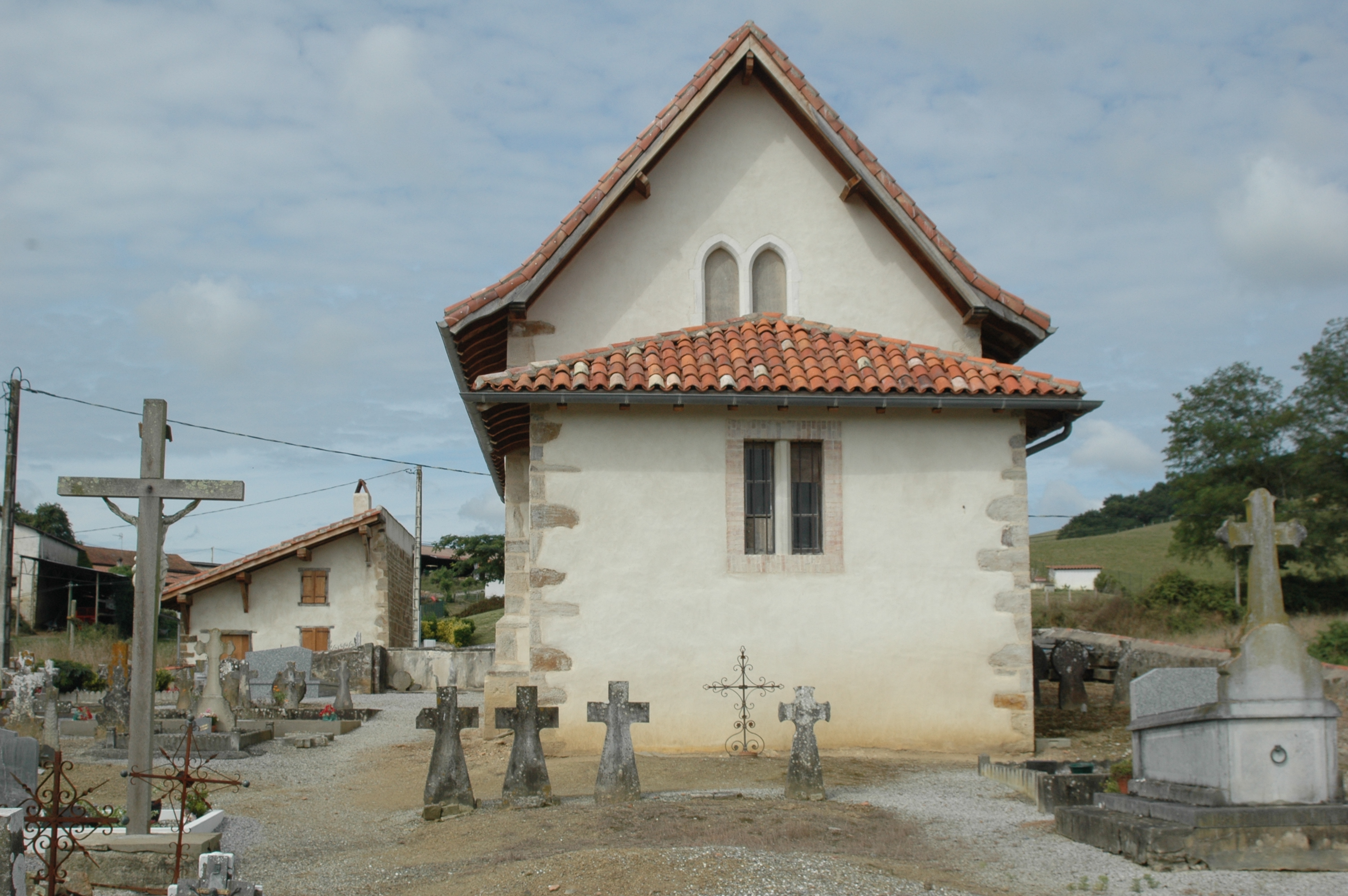 L'église de Succos, avec au fond, la benoîterie et son fronton